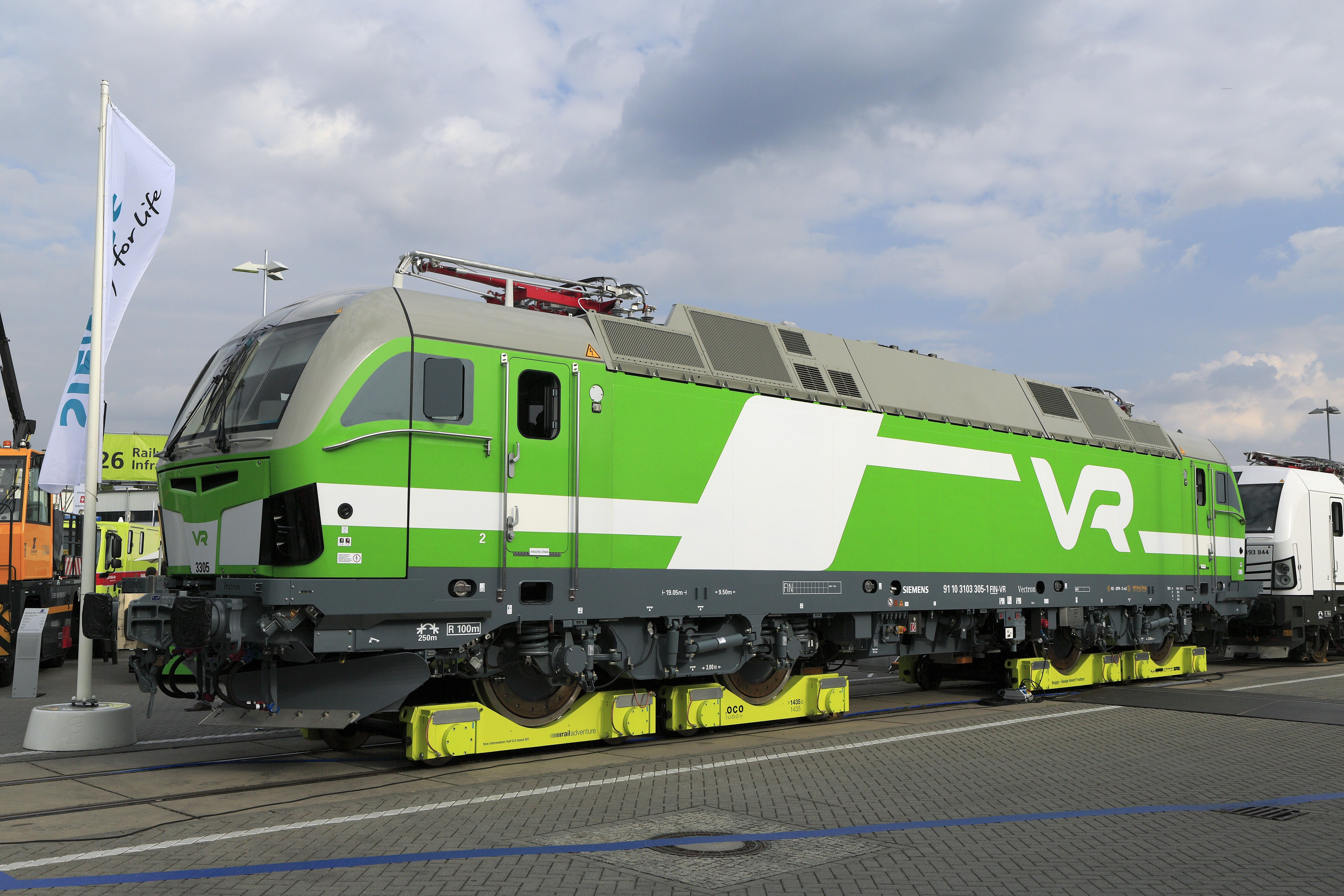 Serienlokomotive für die VR auf Überführungsrollböcken. Während DB Cargo zwischen dem Herstellerwerk in München-Allach und den Ostseehäfen nur Straßentransport anbieten konnte, war die Firma Rail Adventure in der Lage, Überführungsrollböcke bereitzustellen, auf denen die Lokomotiven nahezu vollständig ausgerüstet mit 60km/h befördert werden können. Abgebaut sind nur Aufstiege und Rangiertritte.Die Lokomotiven der bisherigen VR-Reihe Sr3 sind mit zwei zusätzlichen Hilfsdieselmotoren für Rangierfahrten in fahrleitungslosen Gleisen und einer Funkfernsteuerung ausgerüstet. Das UIC-Raster ist leer, wegen der unterschiedlichen Anforderungen nach TSI und GOST wird das auch so bleiben. Ein technisch durchaus möglicher Durchlauf in das GUS-Netz ist derzeit nicht vorgesehen.